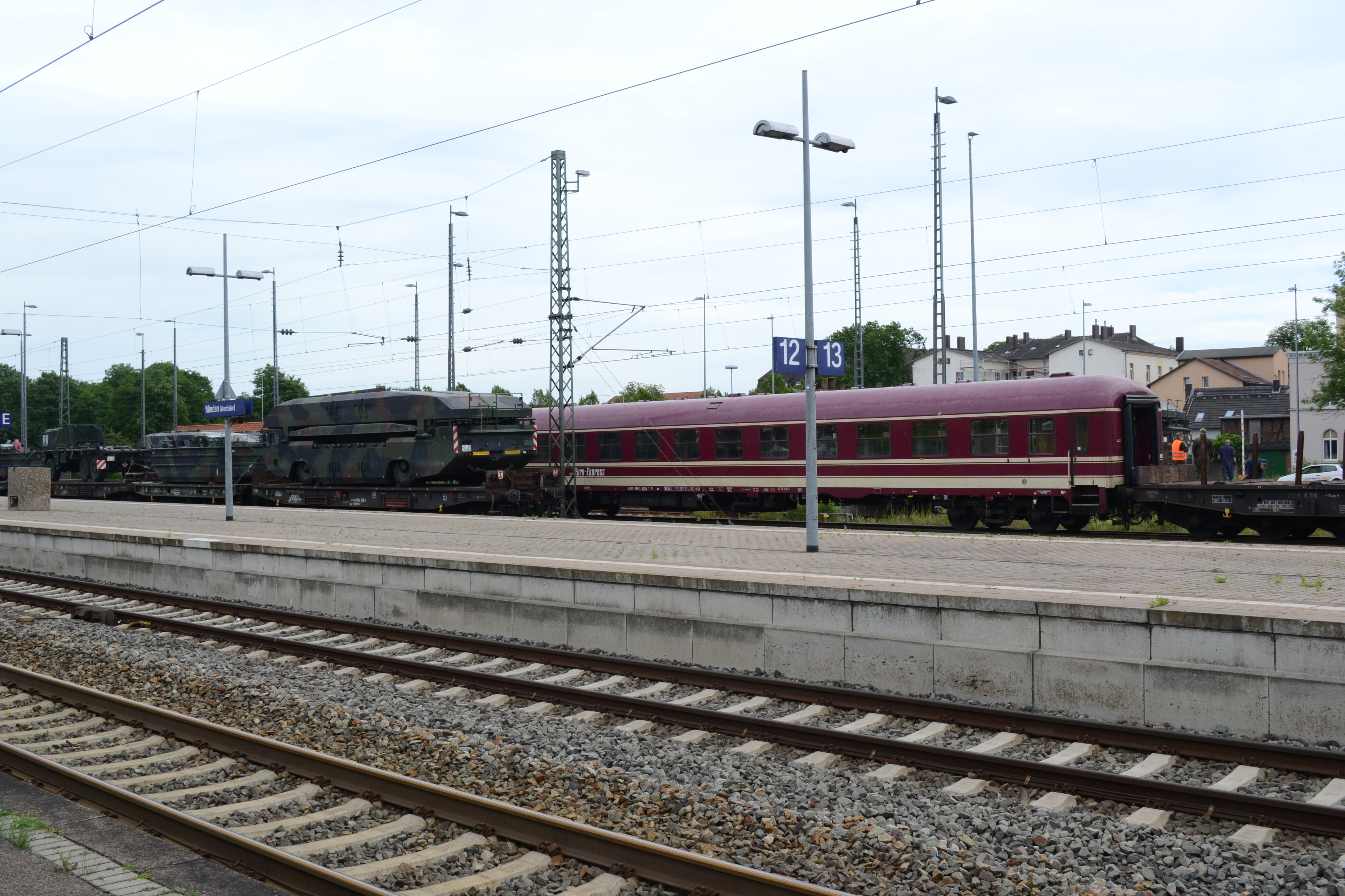 Militärzug an de4r Verladerampe im Bahnhof Minden